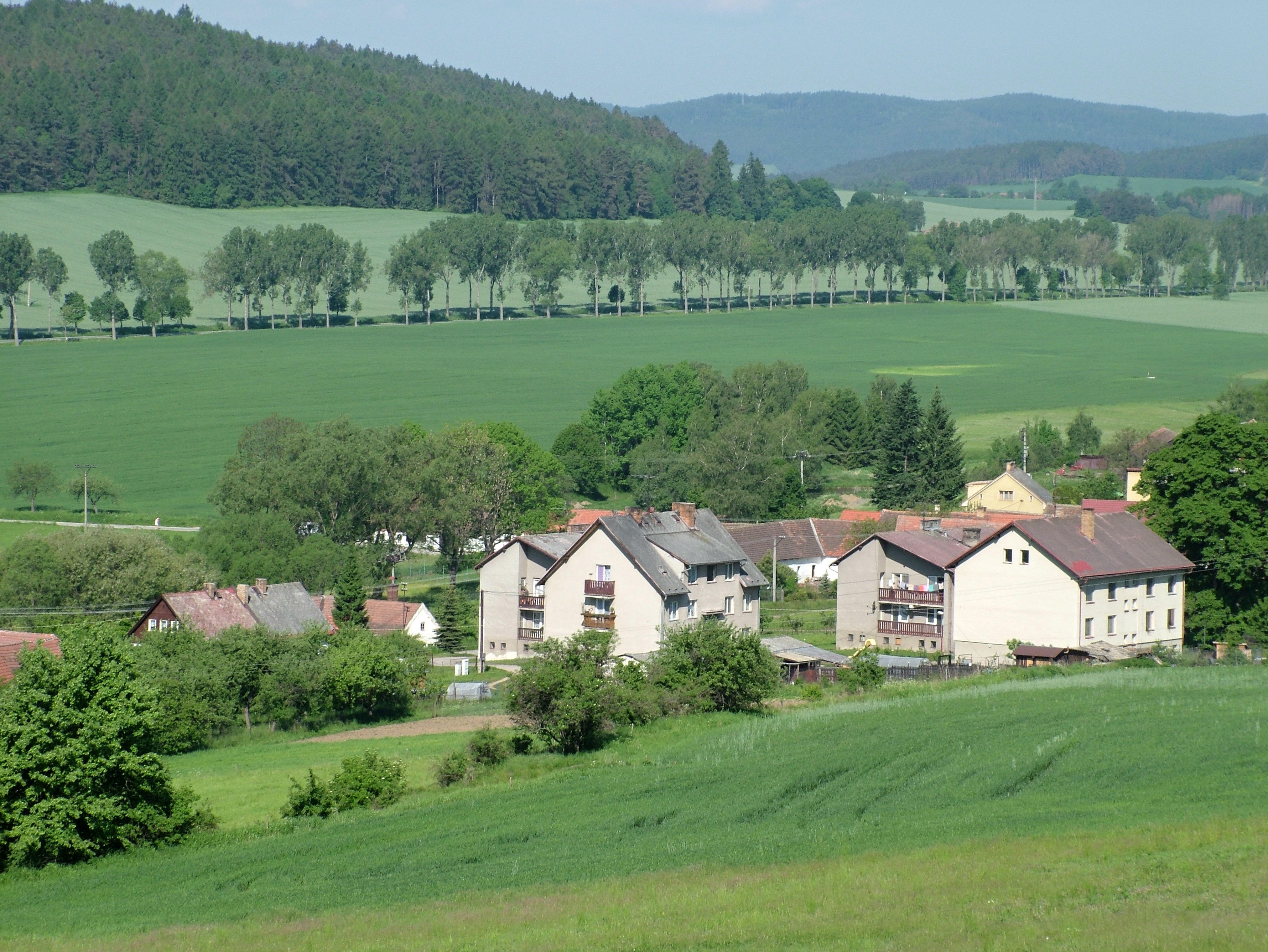 obce v Čechách